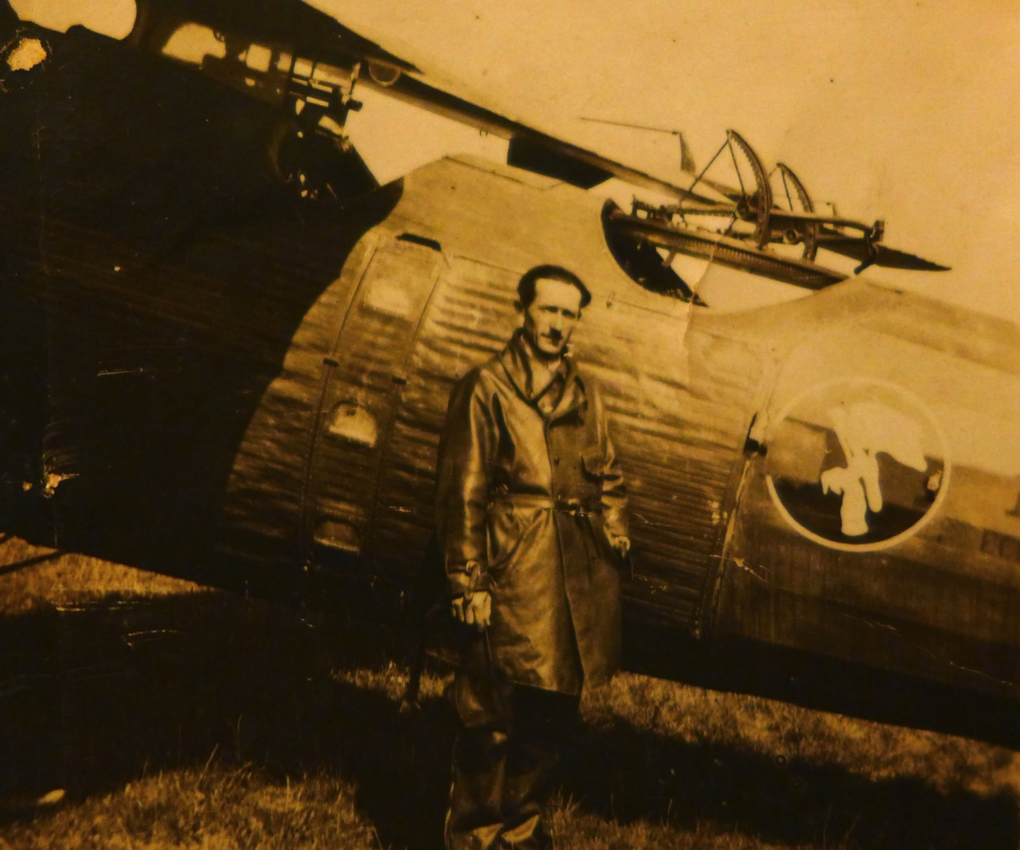 Léopold Aubry devant son Latécoère 26-6 de l'Aéropostale, 1929